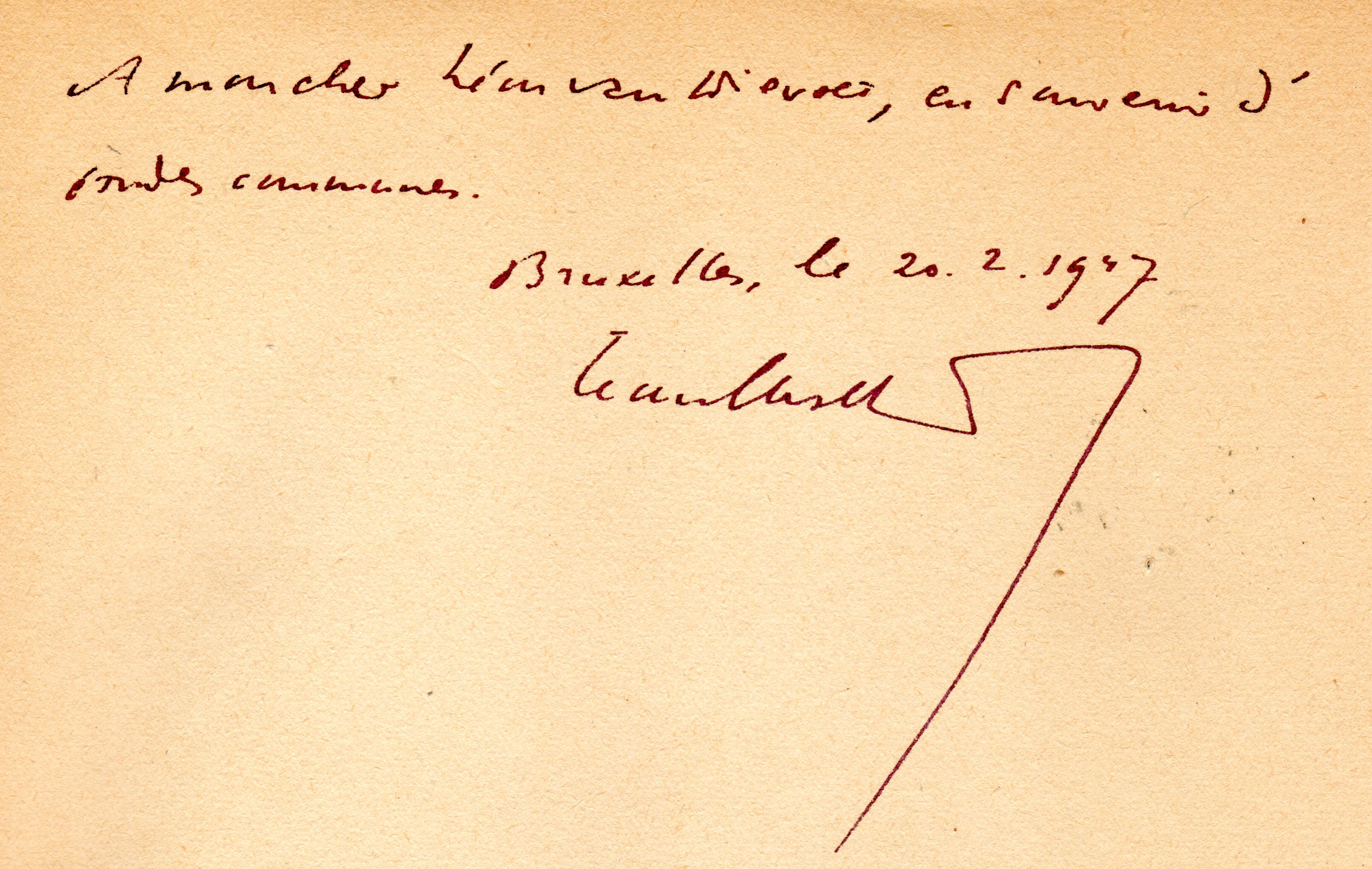 Dédicace autographe de Jean Mallinger à Léon van Dievoet , architecte (1907-1993), 20 février 1947